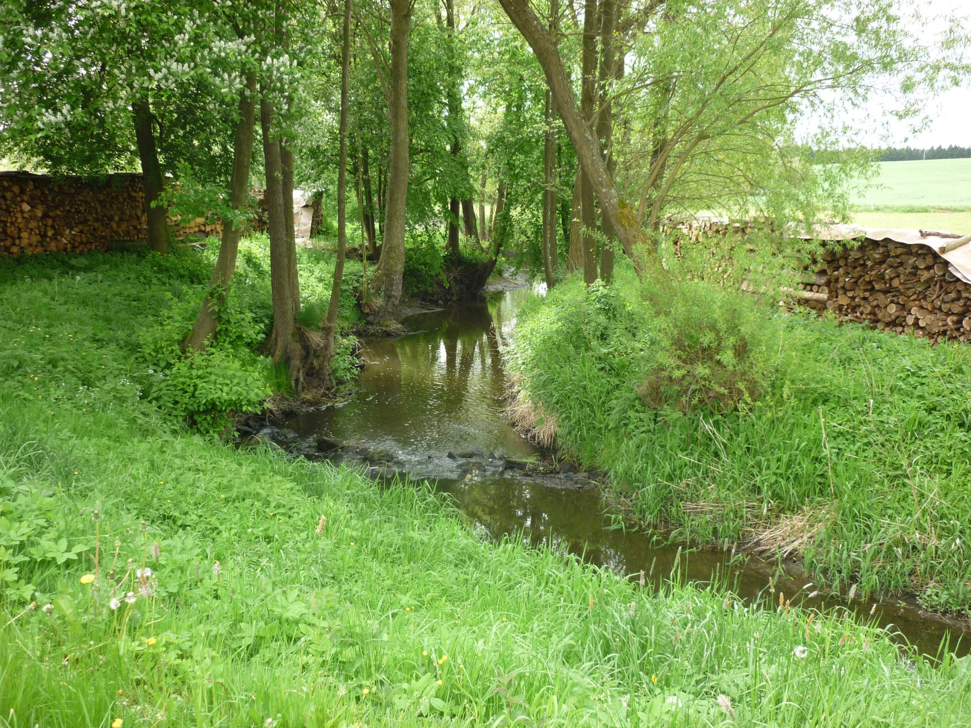 Myslůvka - potok při průtoku vsí